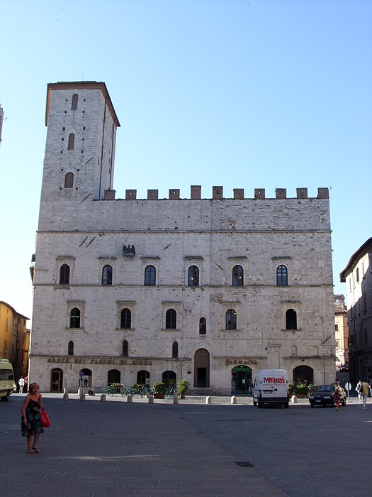 Todi - Palazzo dei Priori